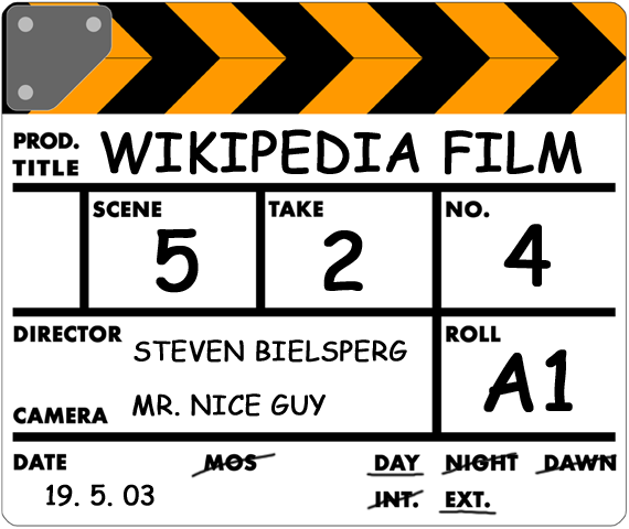 Beschriftete Filmklappe aus Plexiglas